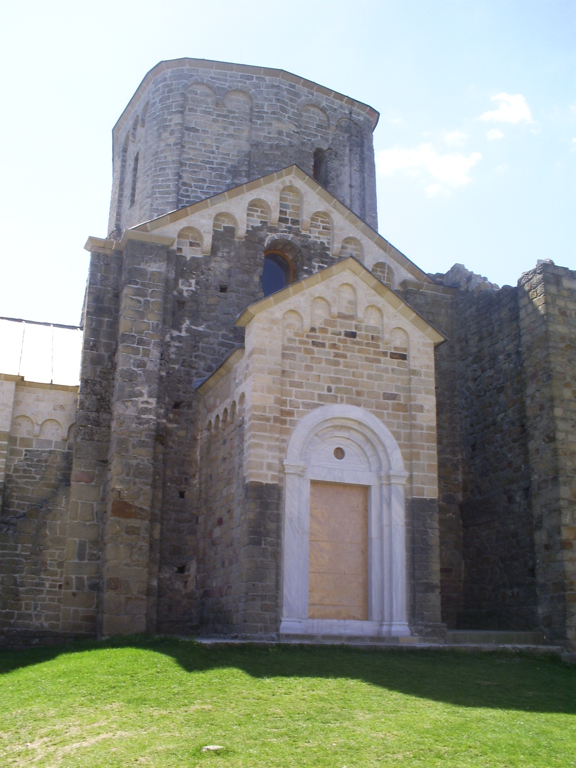 Manastir Djurdjevi stupovi